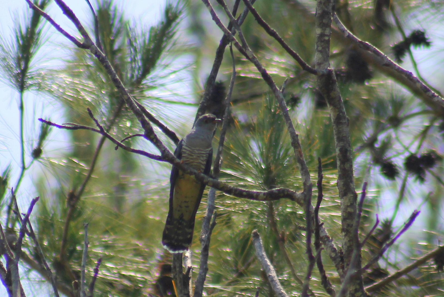 Madagaskarkoekoek